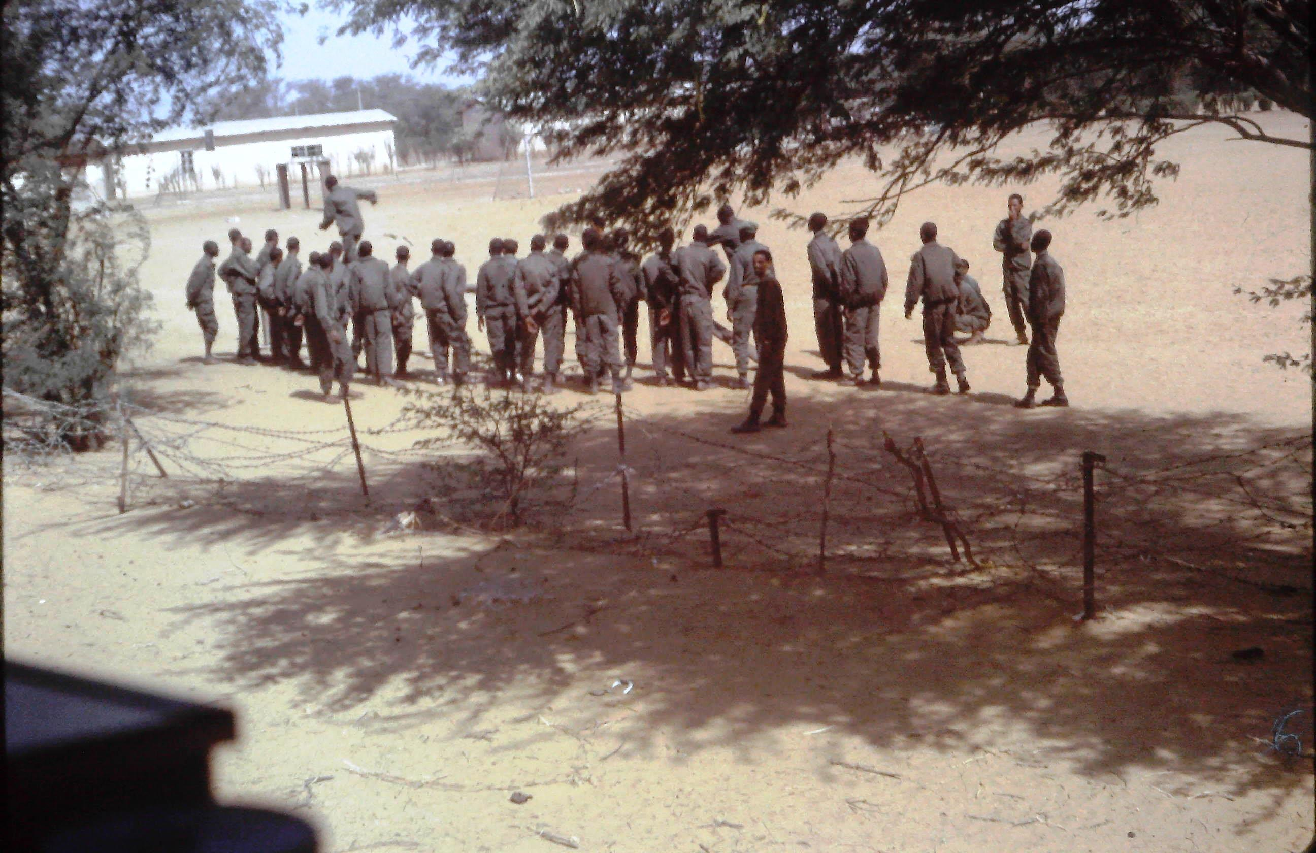 En 1972, exercice de l'armée mauritanienne prés du fleuve Sénégal à Rosso.